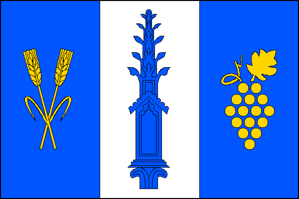 vlajka,Práče , okres Znojmo